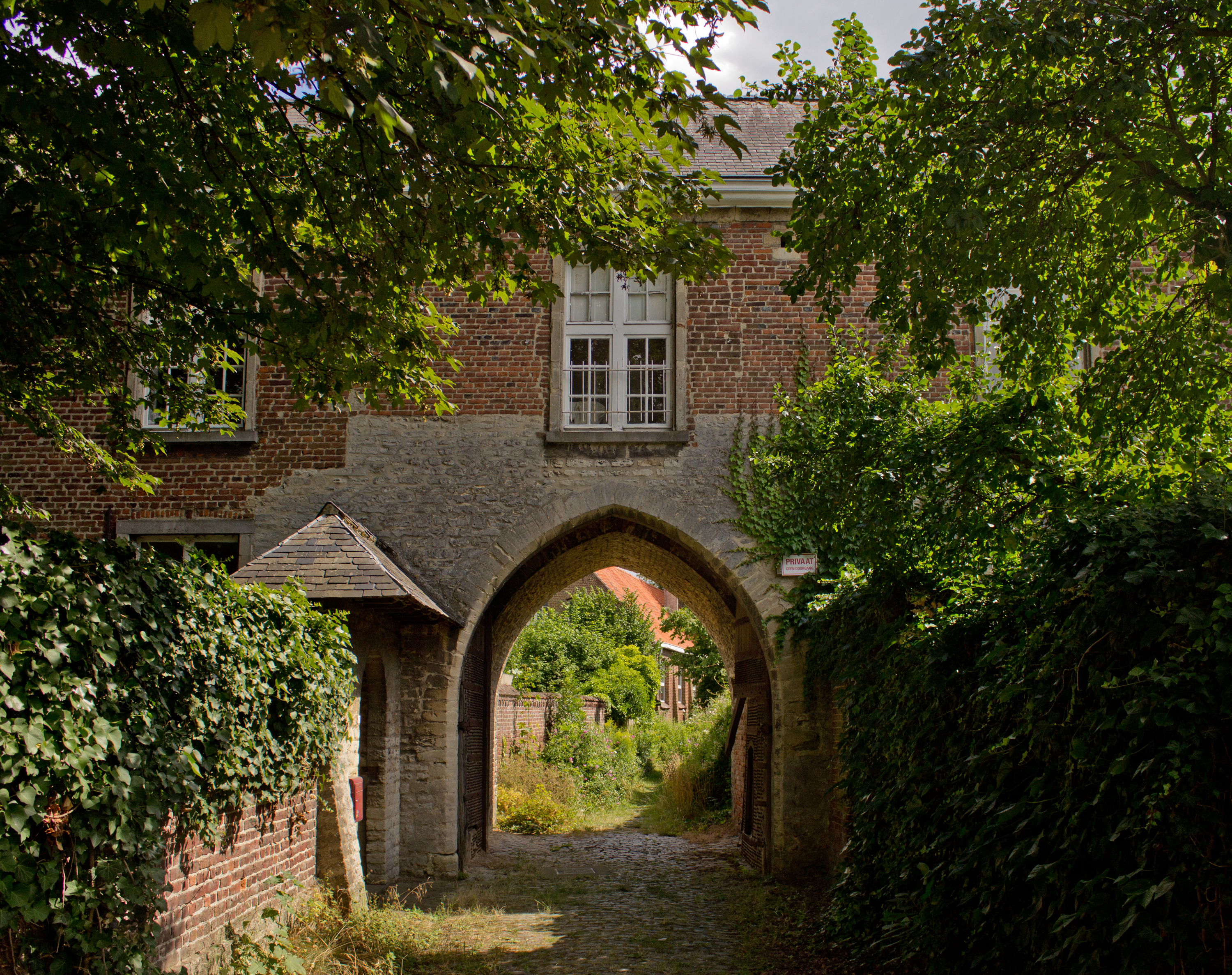 Overblijfselen van de benedictijnenvrouwenabdij, Kortenberg.